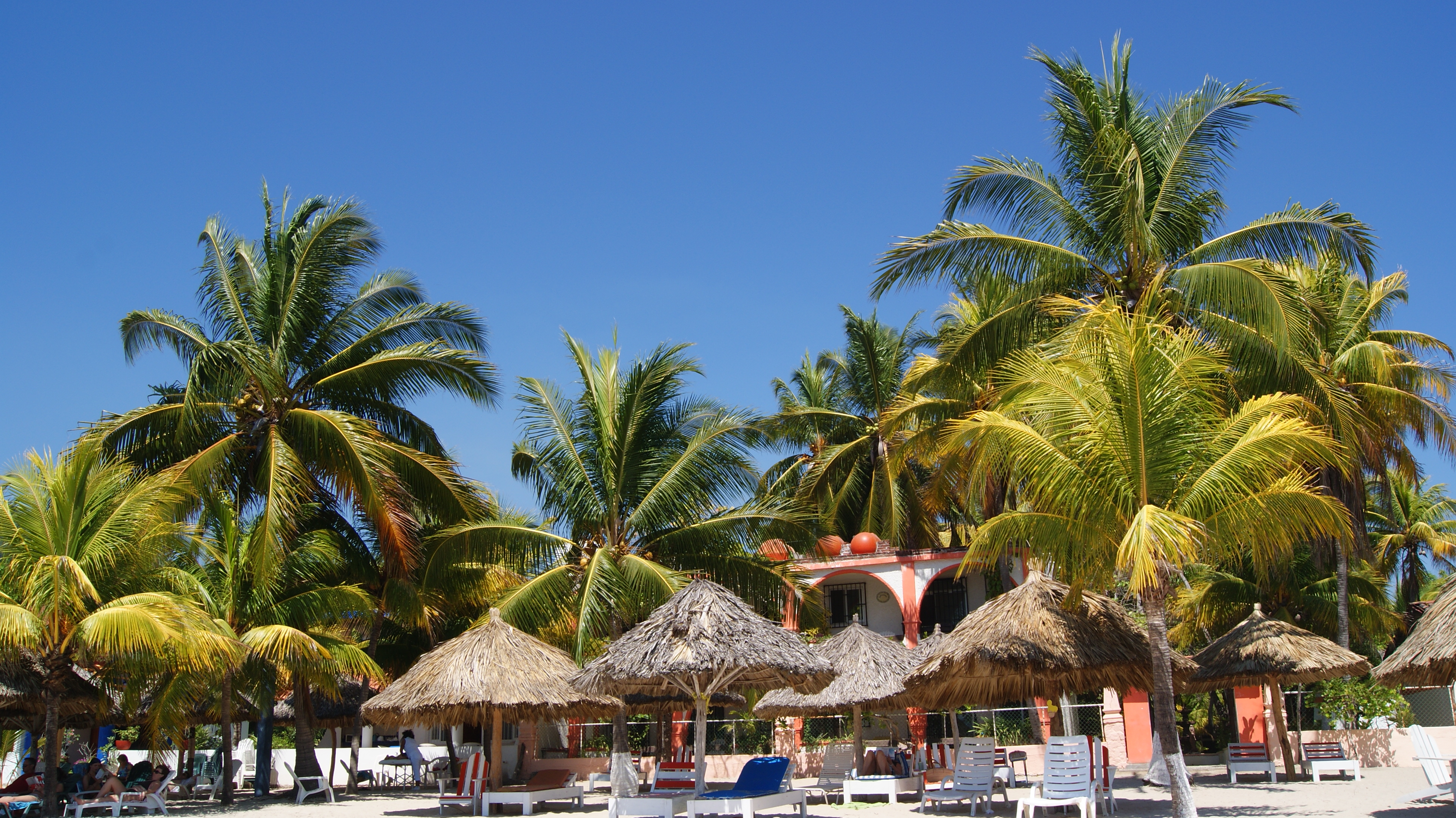 Playa "La ropa"/zihuatanejo/Guerrero/México.